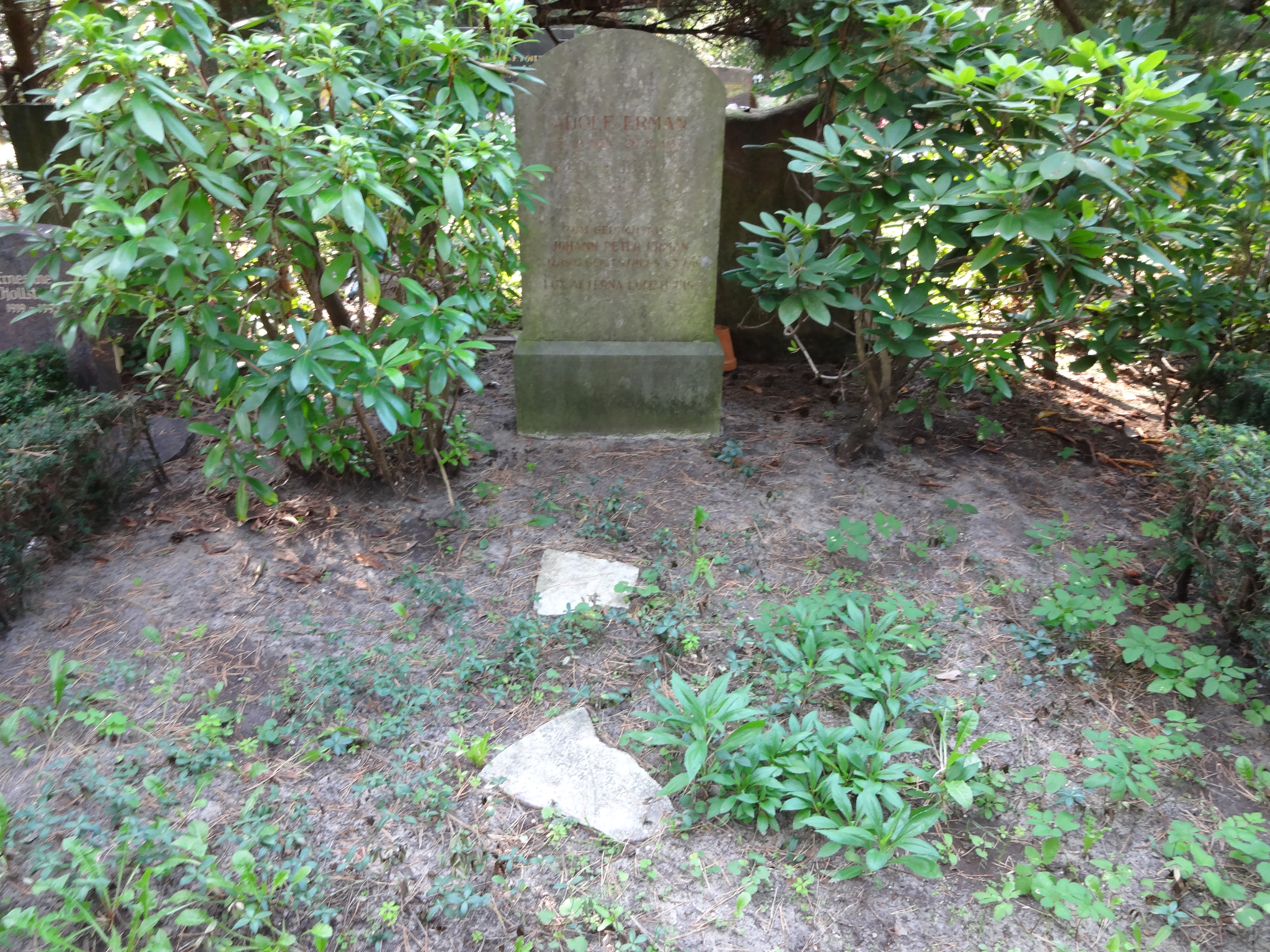 Ehrengrab von Erman, Adolf auf dem Waldfriedhof Dahlem, der Friedhof ist als Gartendenkmal der Stadt Berlin (Nr. 09045949)This is a photograph of an architectural monument.